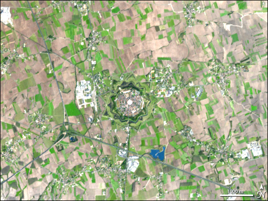 Palmanova, Italy